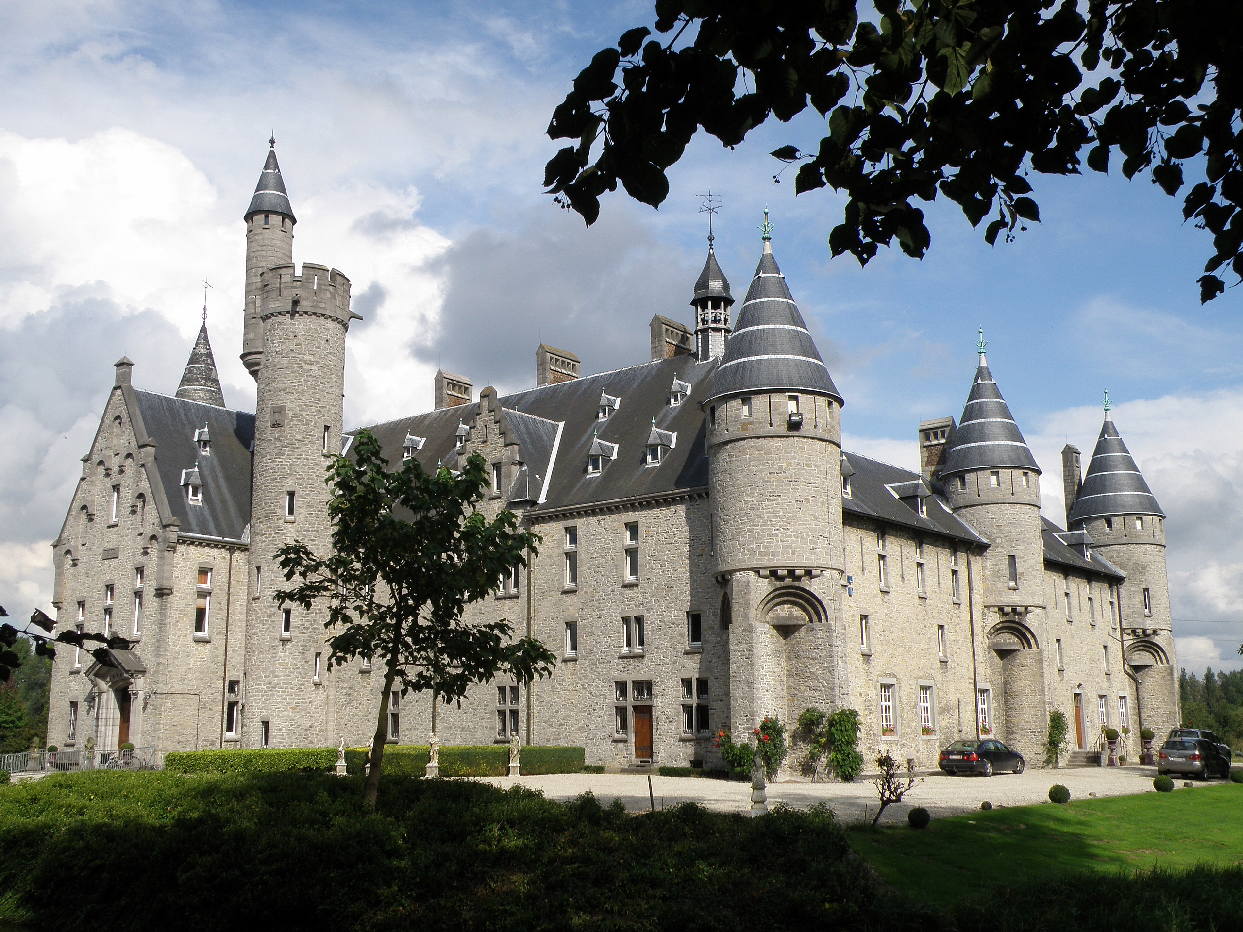 Commune de Bornem, prov. d’Anvers, Belgique. Le Château Marnix de Sainte-Aldegonde (ou château de Marnix de Sainte-Aldegonde, ou simplement château de Bornem), édifié fin XIXe selon des plans d’Henri Beyaert, sis non loin du village de Weert (comm. de Bornem). Ailes sud (à droite) et ouest (à gauche).